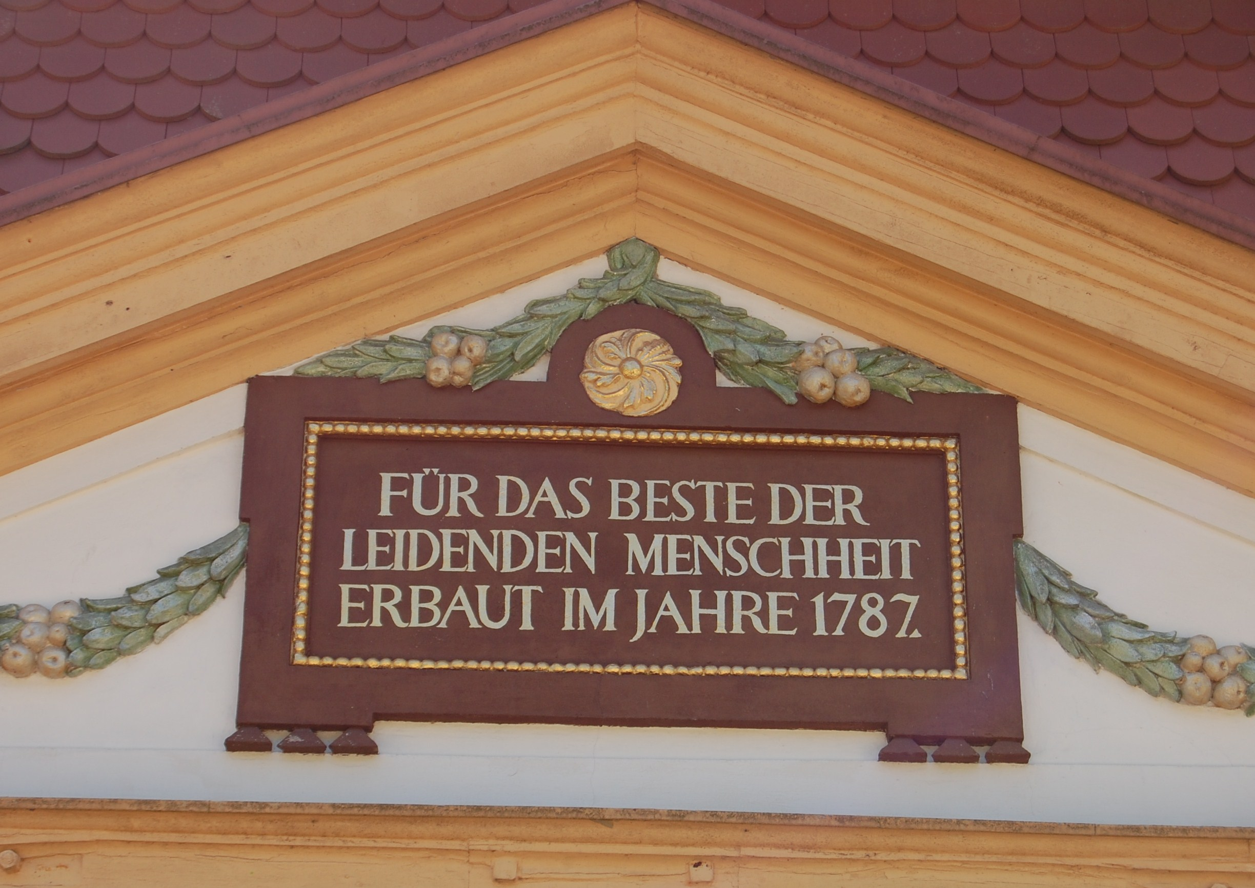 „Für das Beste der leidenden Menschheit erbauet im Jahre 1787“ - Inschrift am Brunnentempel von Bad Bocklet